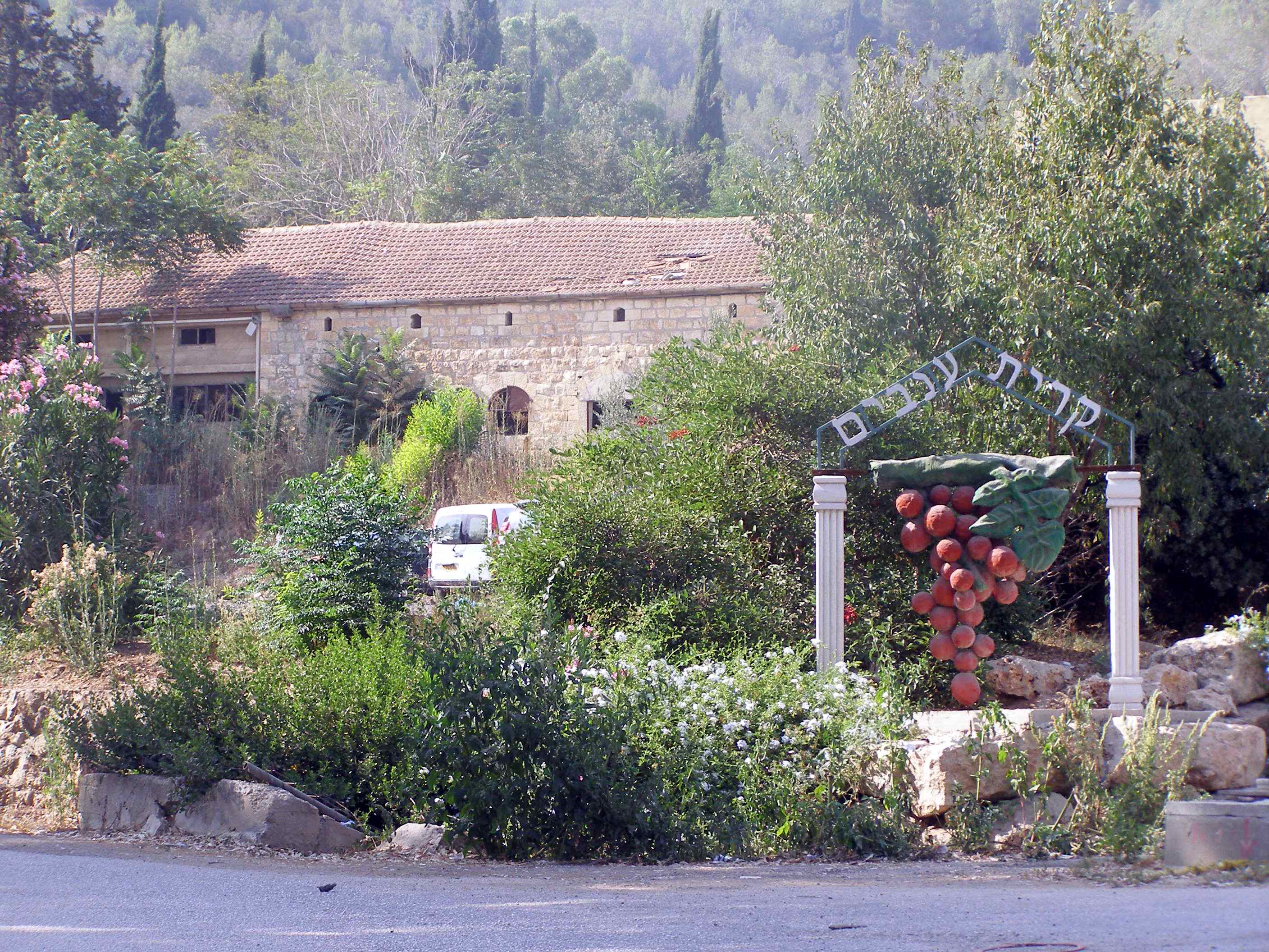 Kiryat Anavim